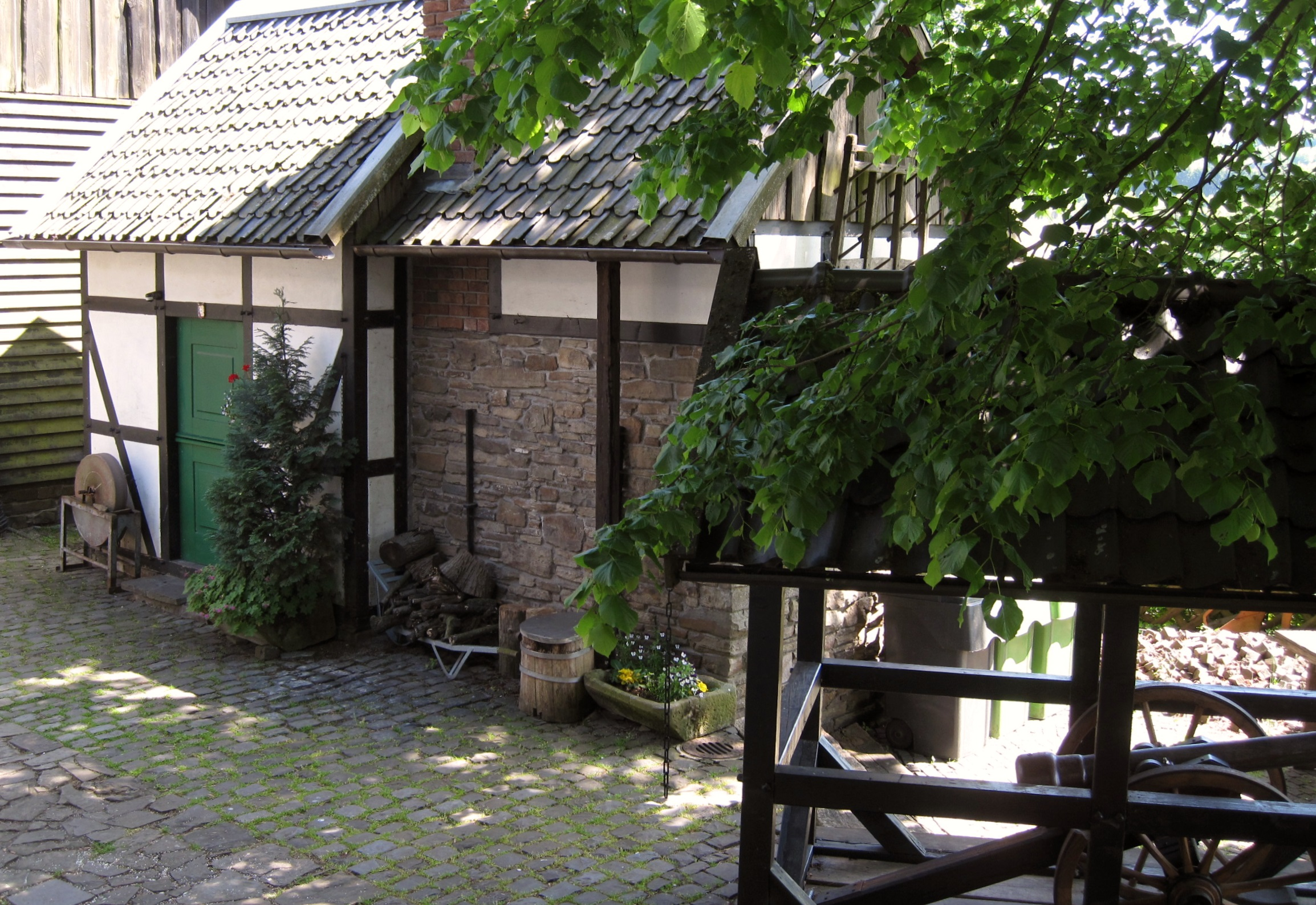 Heimatmuseum in Bergneustadt, Wallstraße 1.